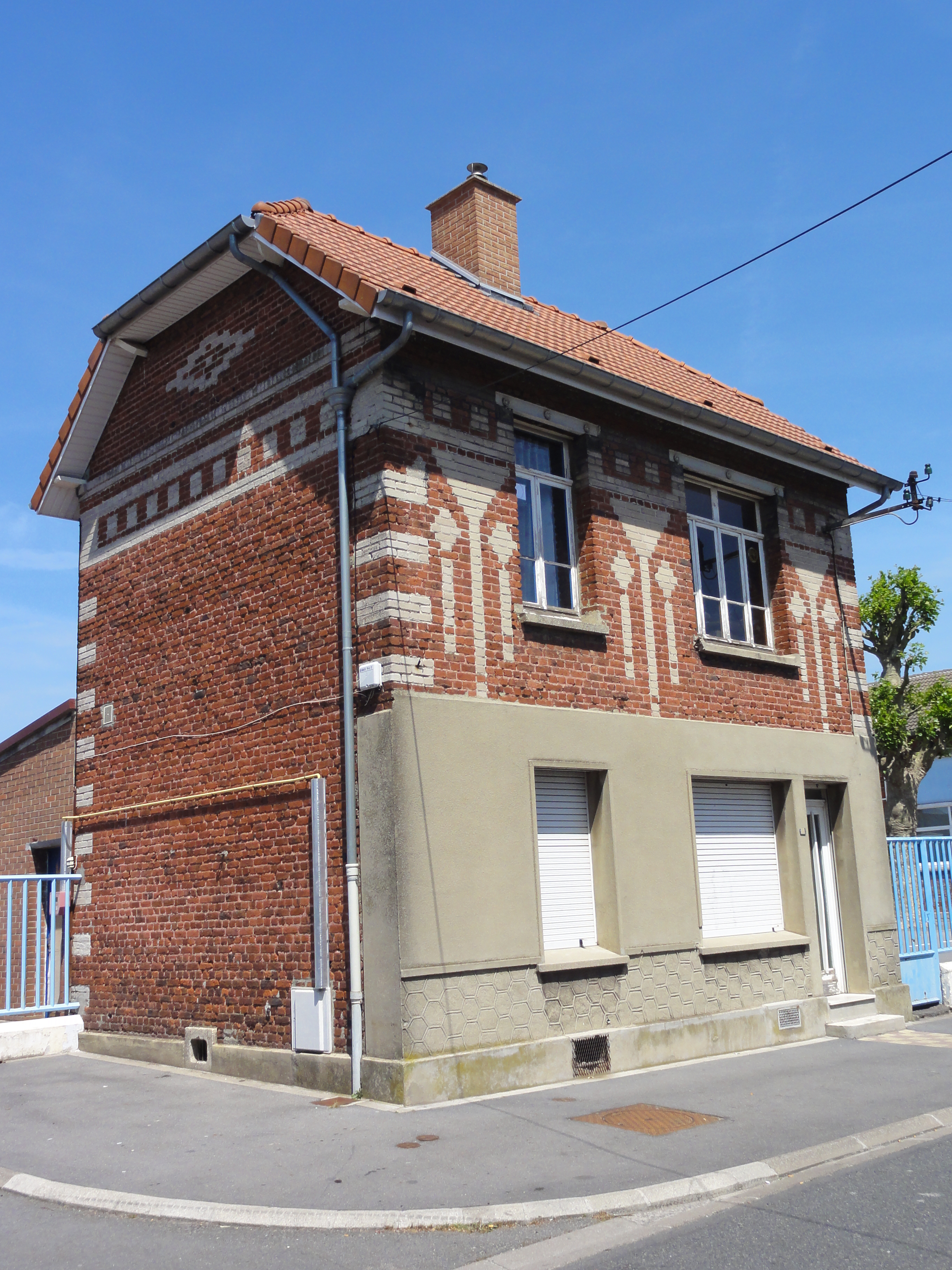 Écoles des cités de la fosse n° 21 - 22 de la Compagnie des mines de Courrières dans le bassin minier du Nord-Pas-de-Calais, Harnes, Pas-de-Calais, Nord-Pas-de-Calais, France.